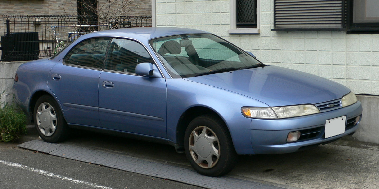 Toyota Corolla Ceres (1994 - 1998) (トヨタ・カローラセレス)